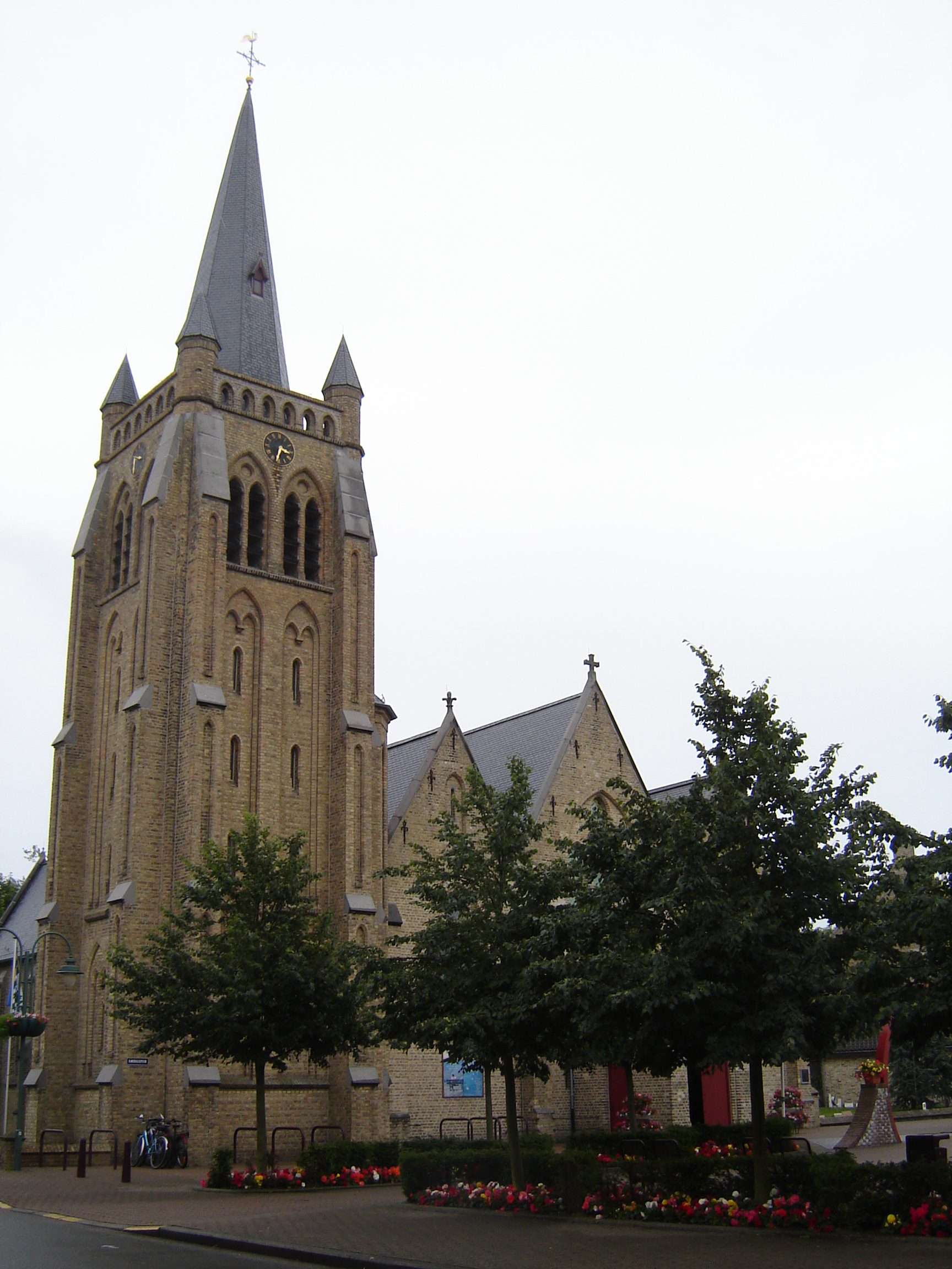 Sint-Pieterskerk in De Panne. Church of Saint Peter in De Panne, West Flanders, Belgium